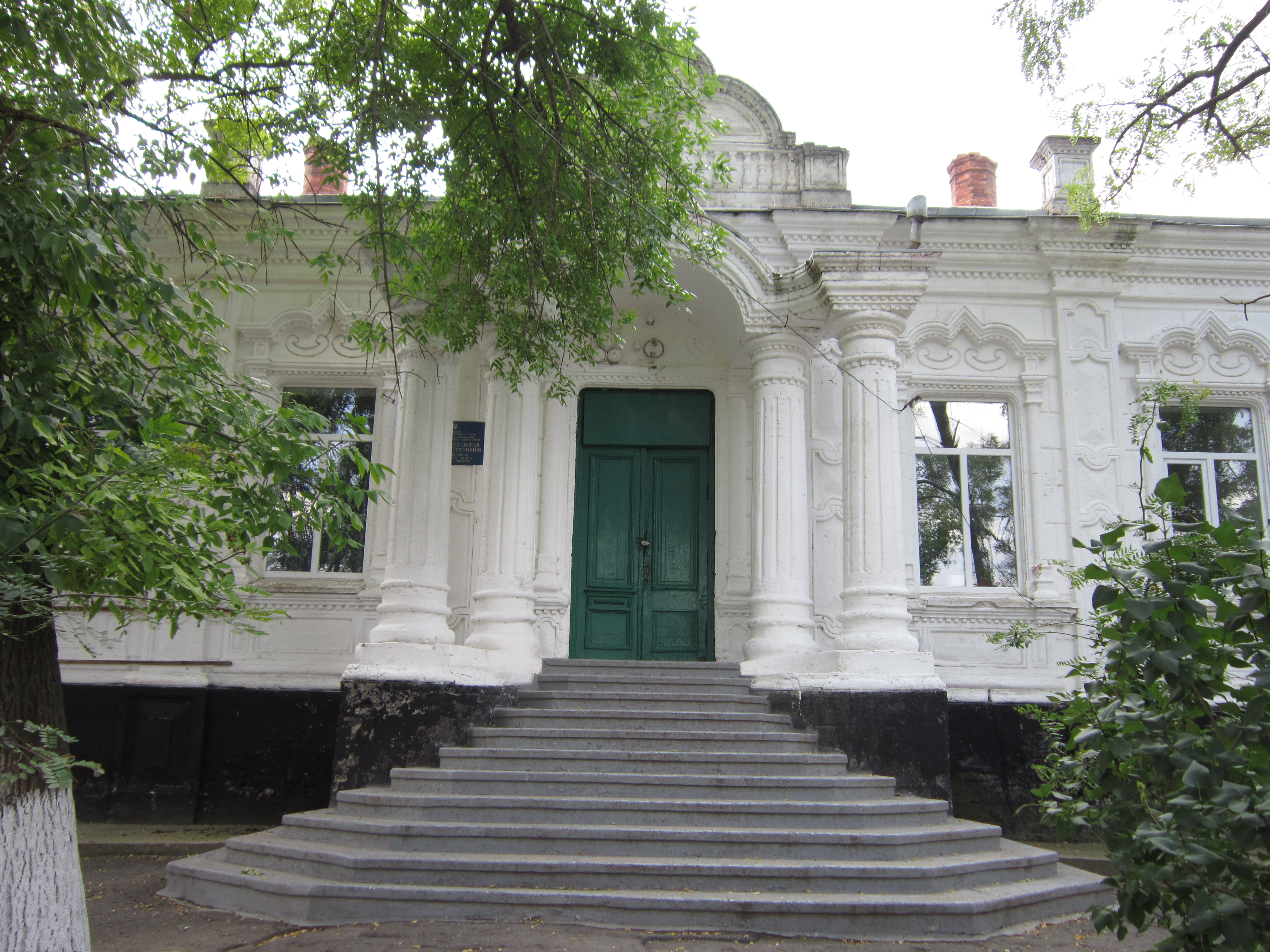 Колишній маєток Л. Юковського, :uk:Михайлопіль, Іванівський район